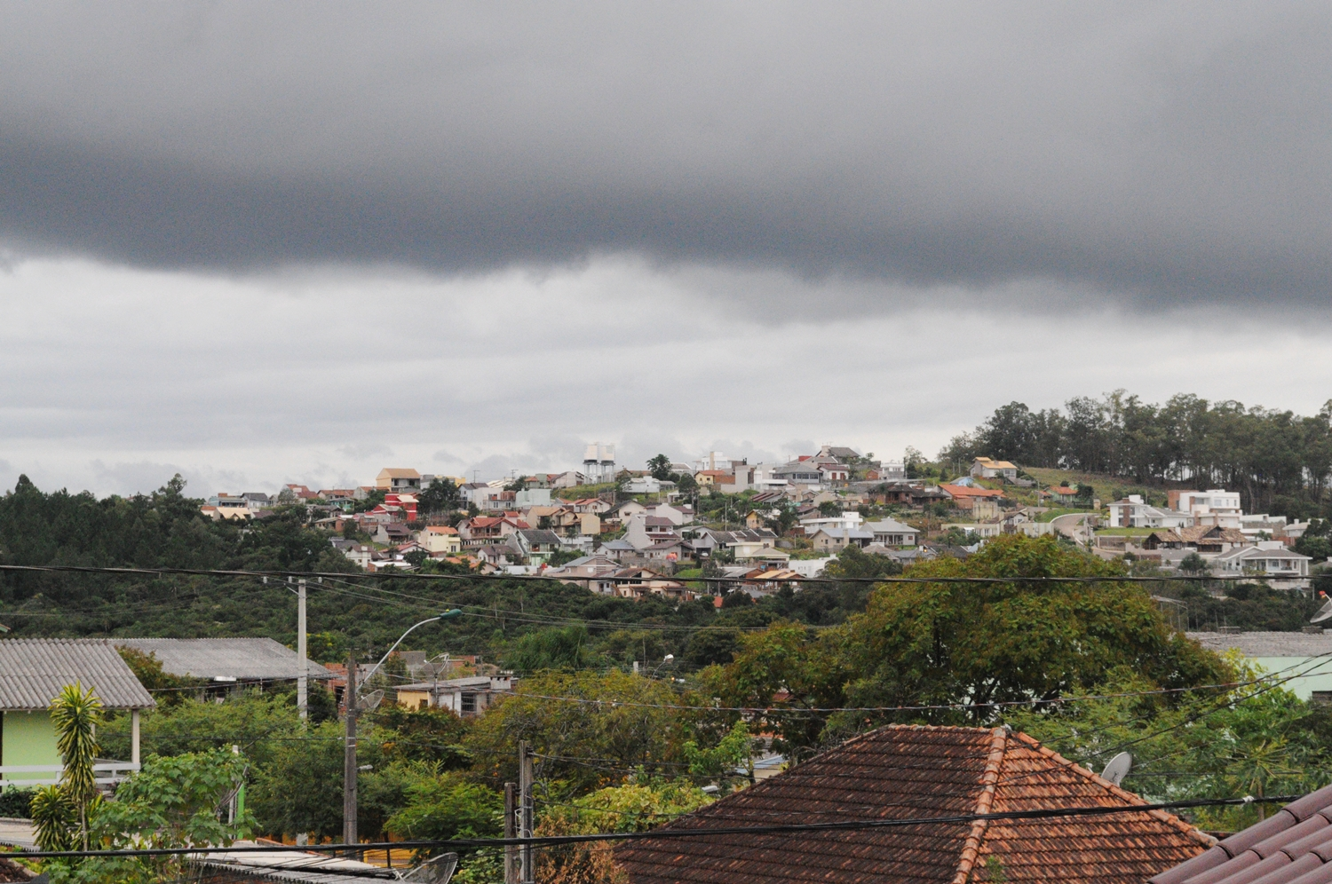 Vista do Bairro Firenze (Campo Bom, RS)